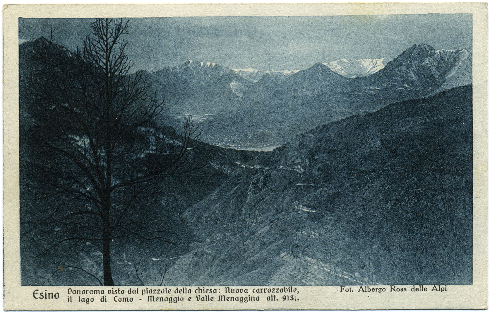 Anonimo, Esino - Panorama visto dal piazzale della chiesa verso il lago di Como - nuova carrozzabile - Menaggio, Esino Lario, XX sec., stampa bn, gelatina bromuro d'argento. 10x15, Courtesy Archivio Pietro Pensa CC-BY-SA, APP_VD_F_002. cartolina (blu) - fronte in basso:Esino Panorama visto dal piazzale della chiesa:Nuova carrozzabile, / il lago di Como - Menaggio e Valle Menaggina alt. 913. Fot. Albergo Rosa delle Alpi